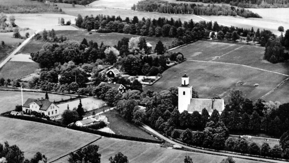 Flygbild över Dunkers kyrka (Södermanland) med omgivningar.